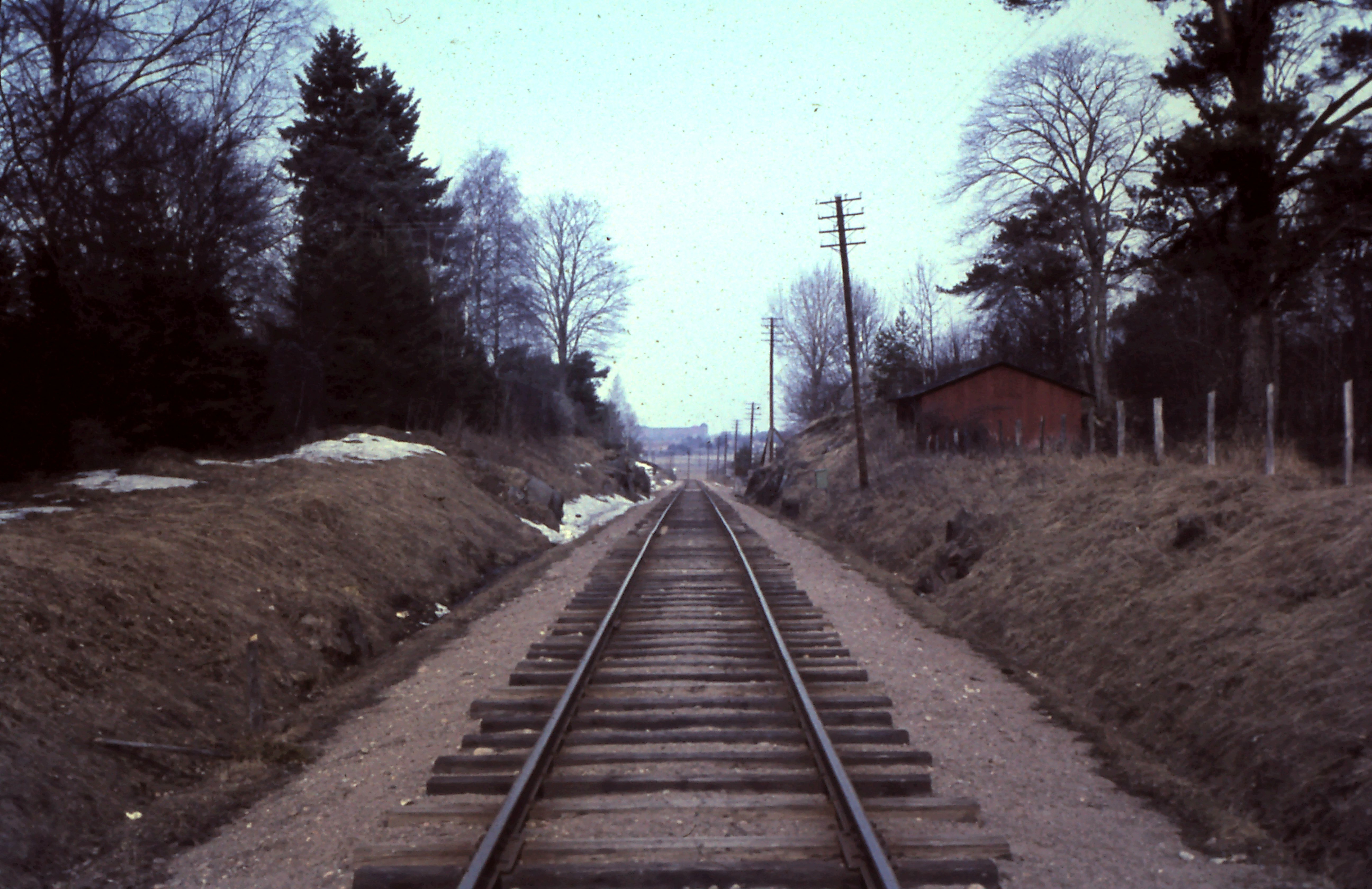 Uppsala-Enköpings Järnväg 1966, Uppsala slott i bakgrunden.